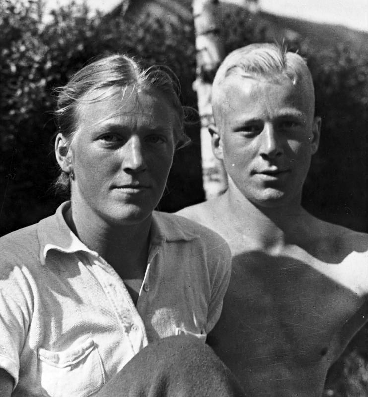 Junge Sportler Verschiedene Porträtaufnahmen von Charakterköpfen, gesammelt im Rassepolitischen Amt der NSDAP [Porträt zweier junger blonder Sportler] Information added by Wikimedia users.